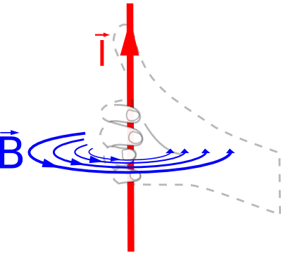 Rysunek przedstawiający regułę prawej dłoni.